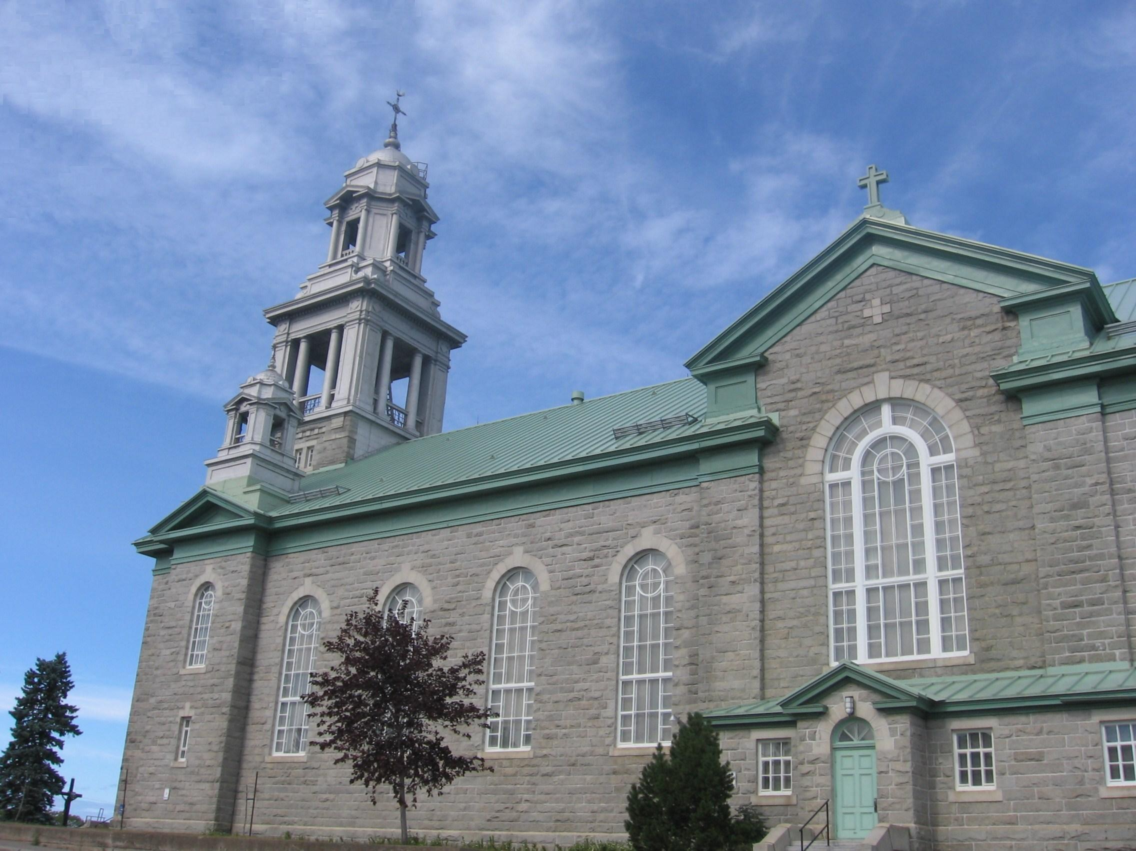 Église Notre-Dame de Lourde à Mont-Joli